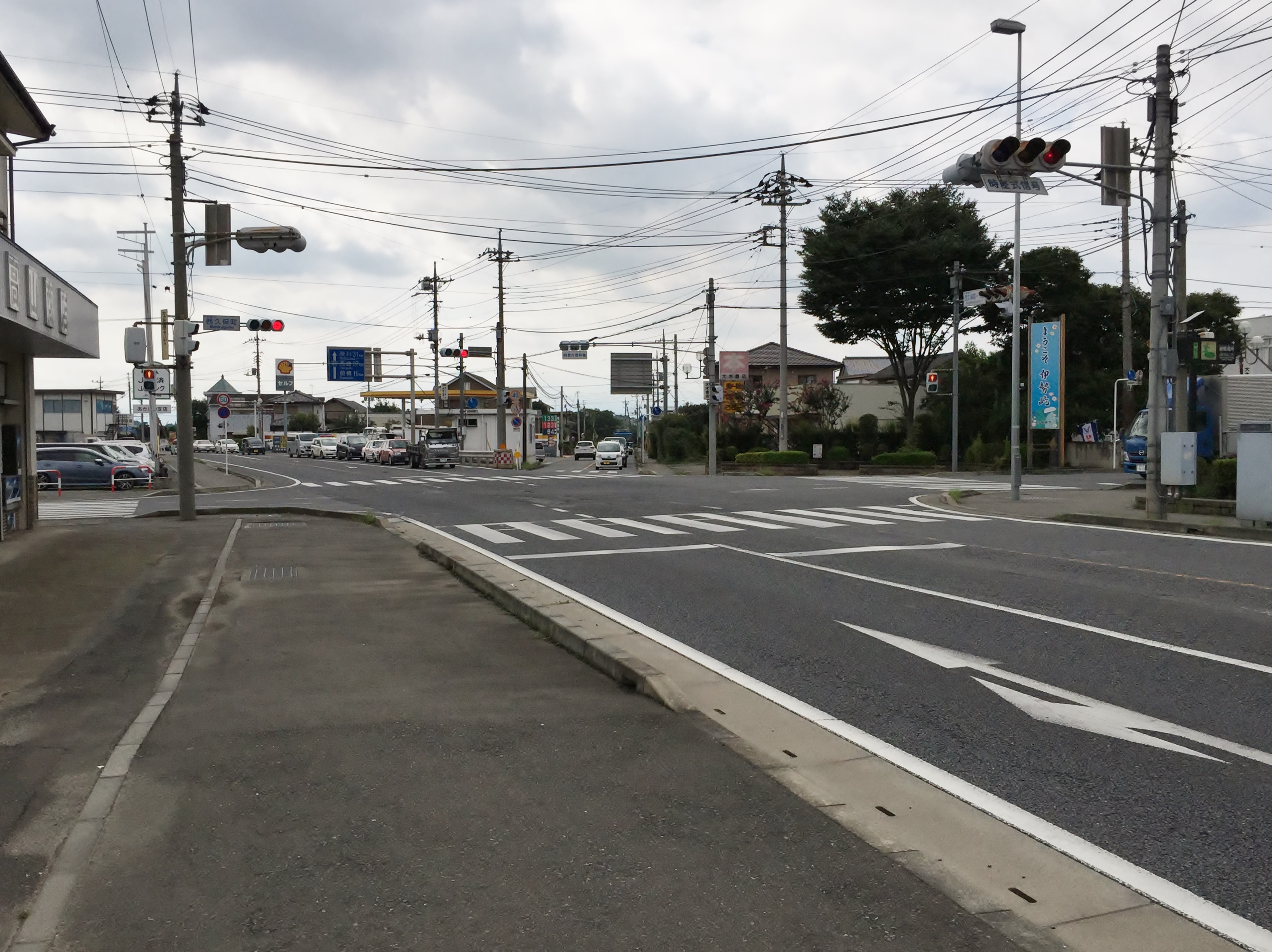 国道50号 西久保町交差点 西久保町一丁目交差点